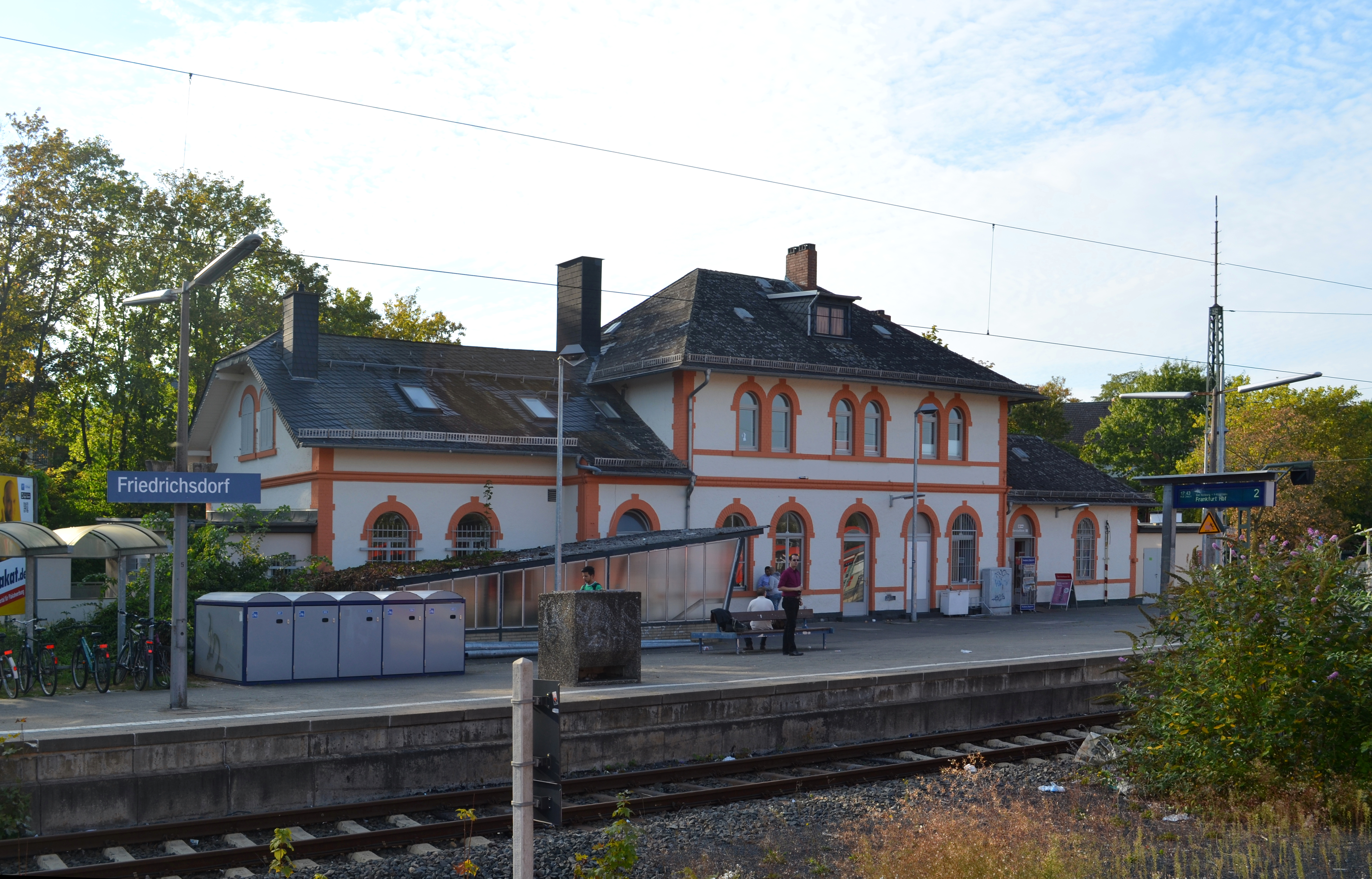 Friedrichsdorf, Bahnstraße 54, Vorderseite